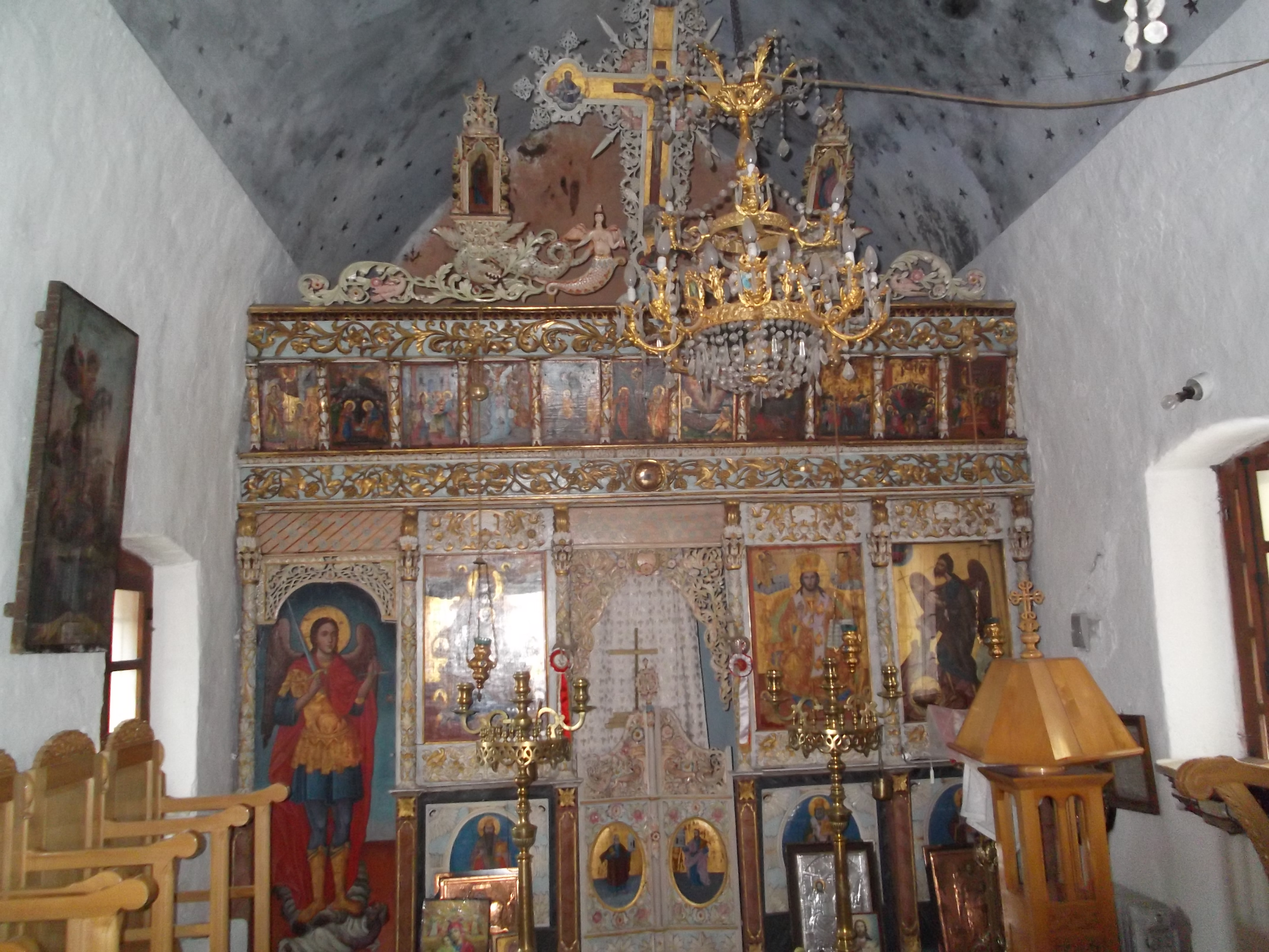 Το εσωτερικό του ναού του Αγ. Γεωργίου στο Θέρισο